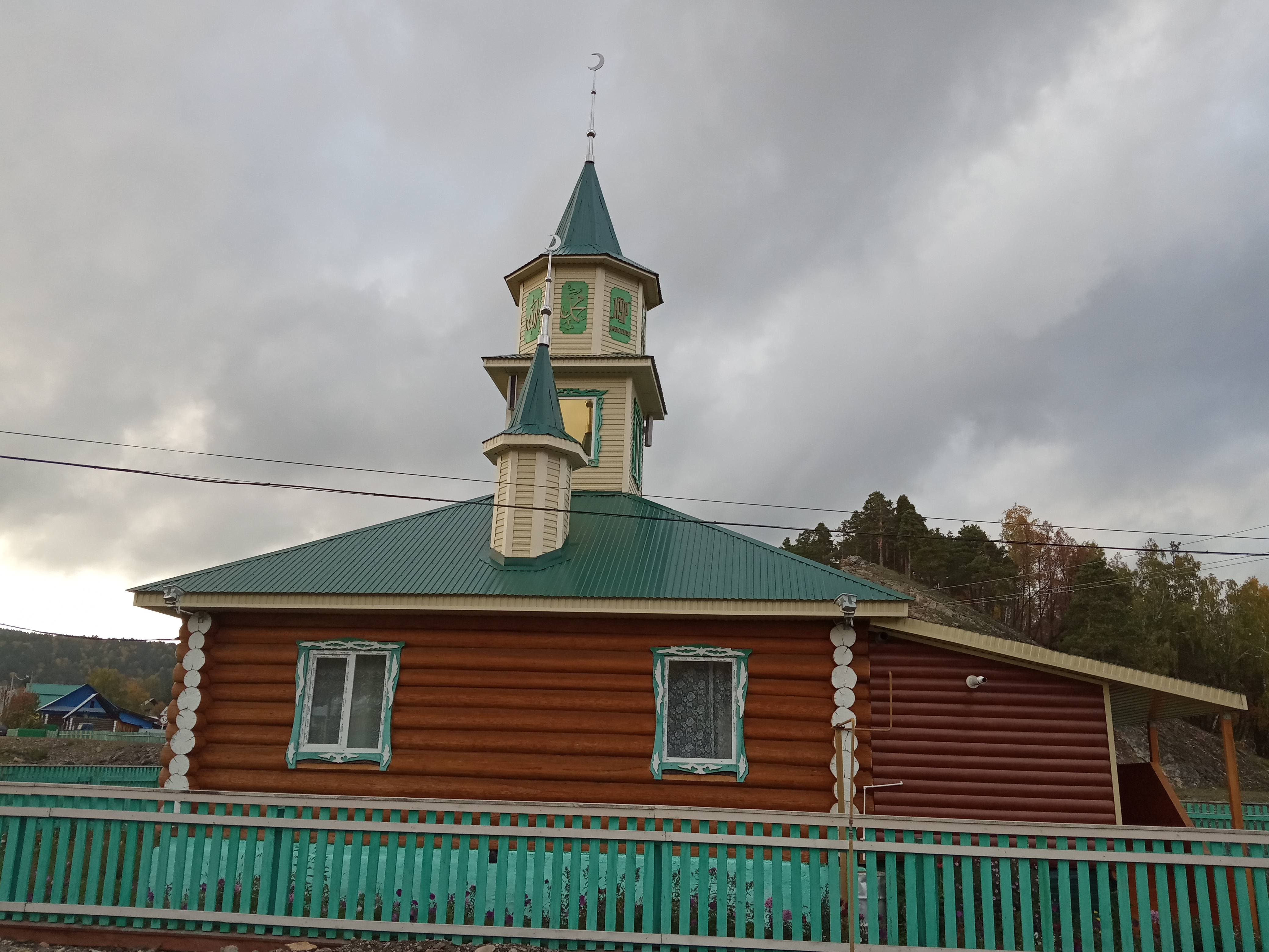 Мечеть "Нур" деревни Кургашлы Бурзянского района